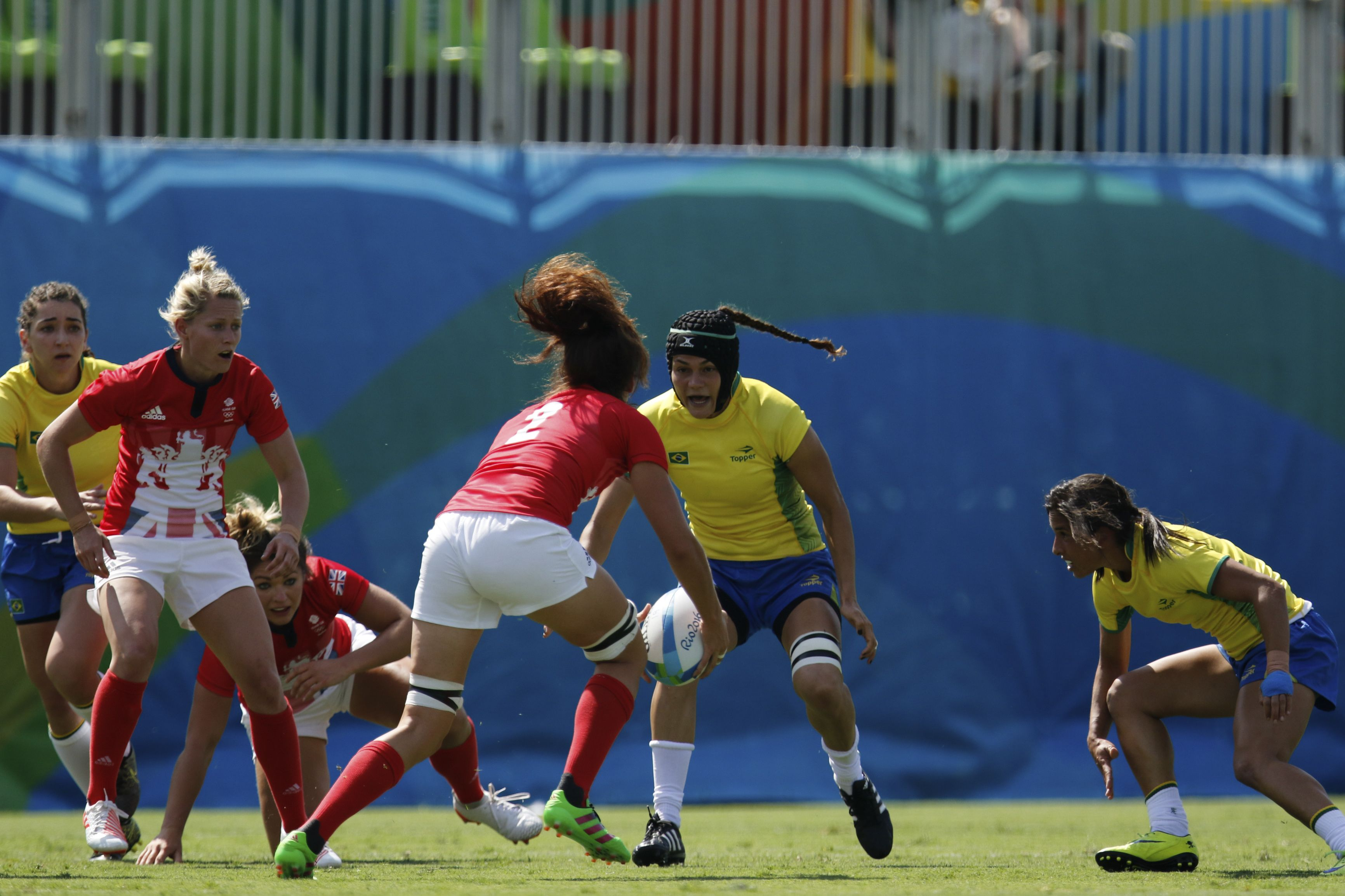 Rio de Janeiro - Brasil é derrotado por 29 a 3 pela Grã-Bretanha na estreia do rugby feminino nos Jogos Olímpicos Rio 2016